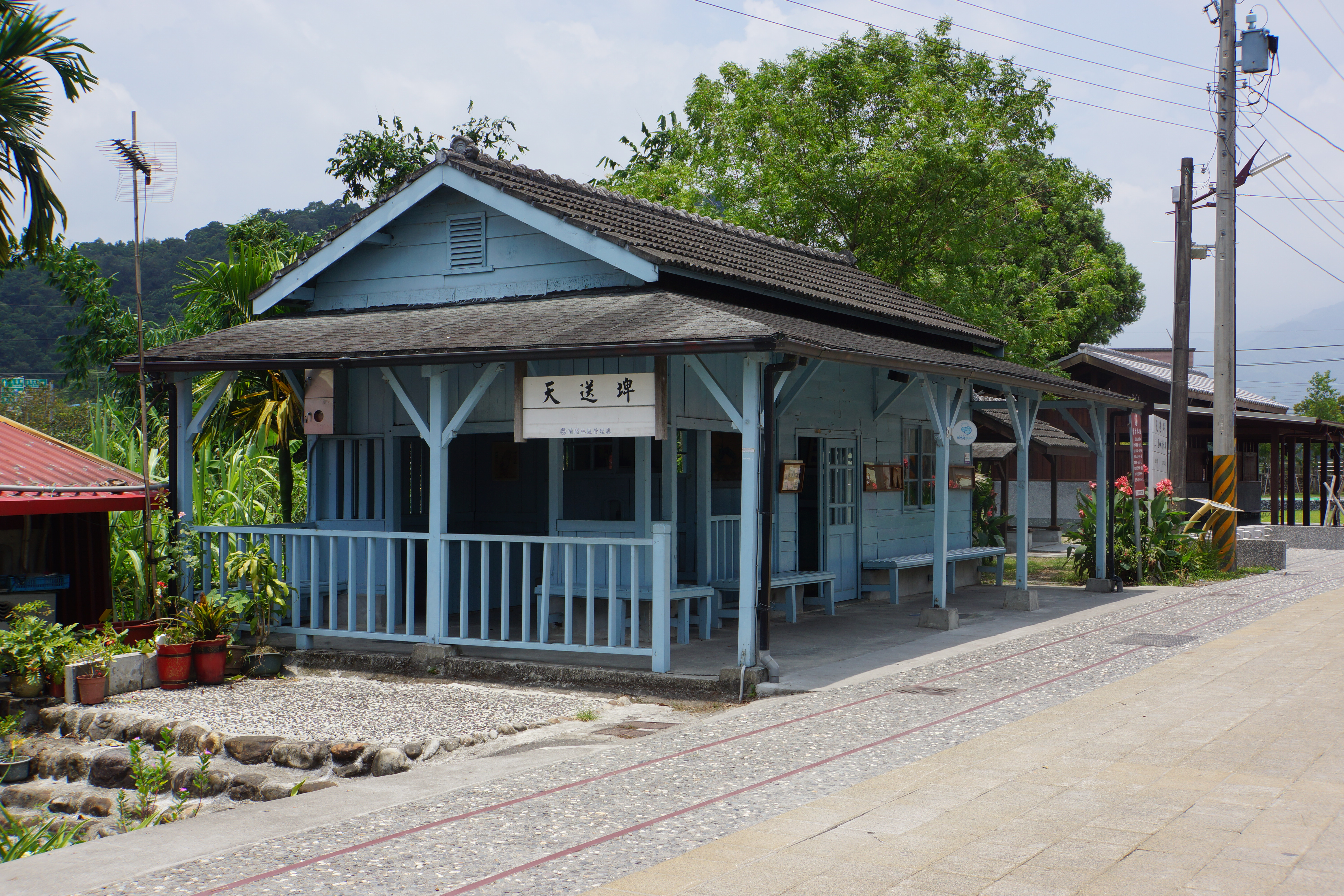 天送埤車站 Tiansongpi Station